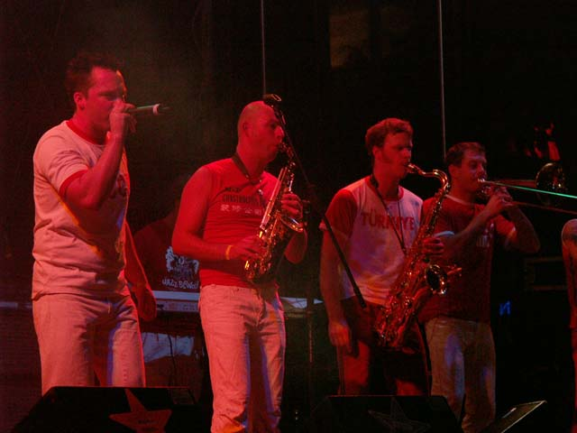 Lax Alex Contrax, einer der präsentierten Livebands beim Ringfest 2004